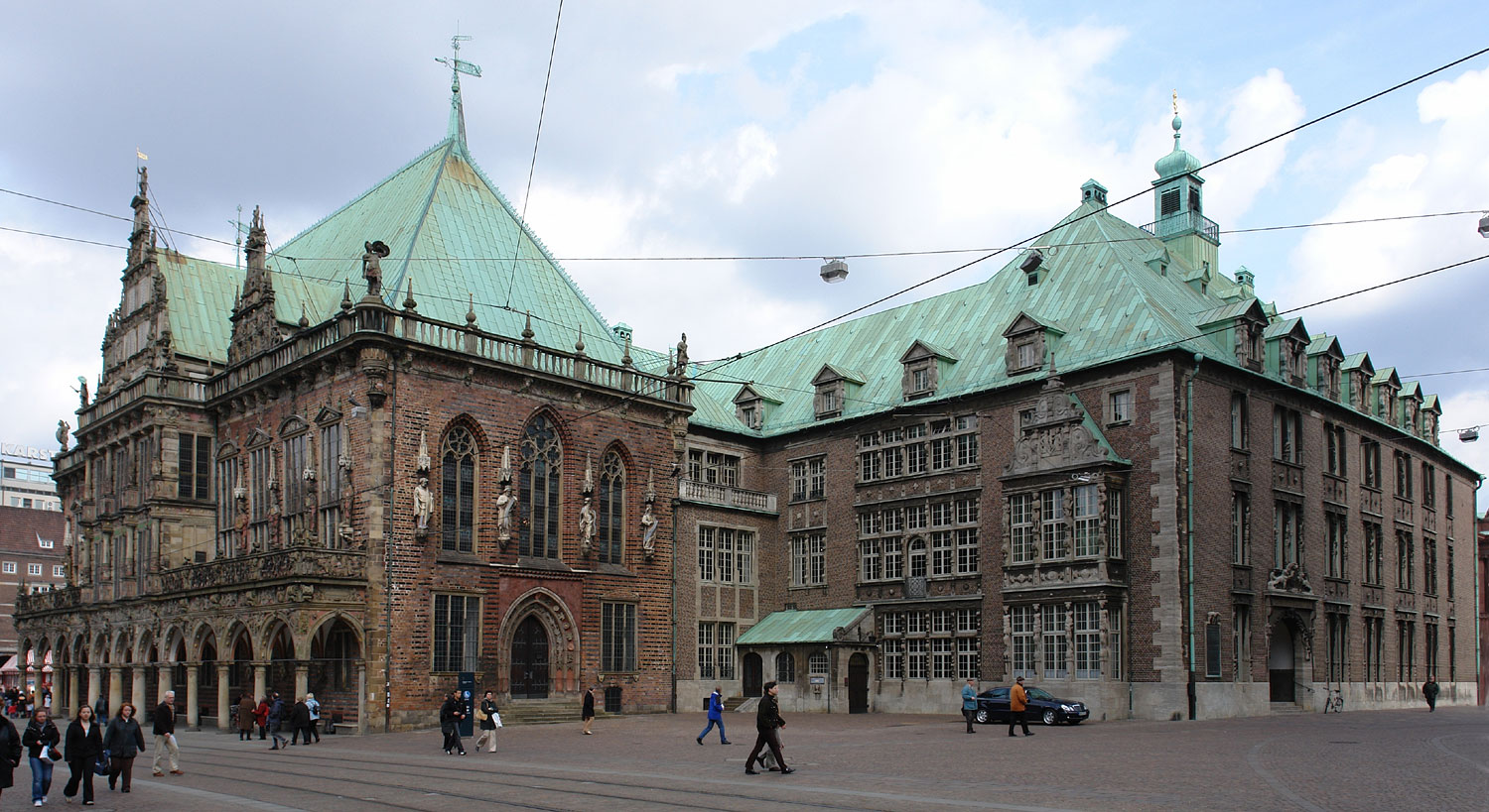 Altes und neues Rathaus in Bremen. Blick aus Richtung Südost Das abgebildete Objekt ist ein geschütztes Kulturdenkmal in der Freien Hansestadt Bremen, mit der Nr. 0066,T beim Landesamt für Denkmalpflege registriert.